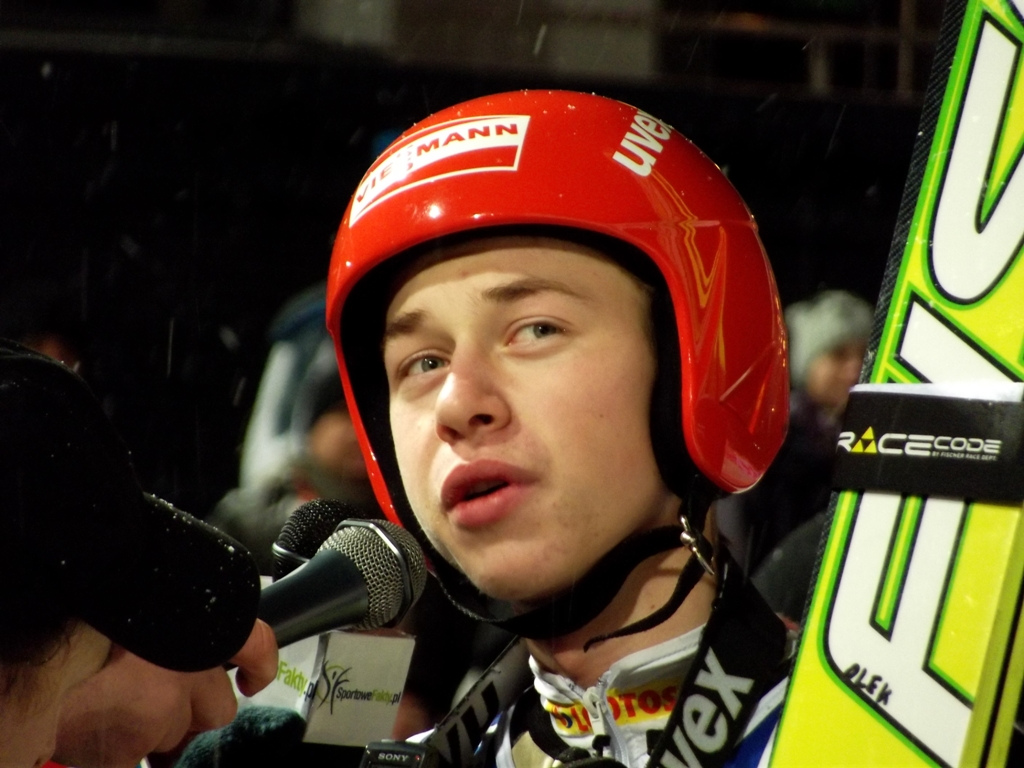 Polski skoczek narciarski Aleksander Zniszczoł podczas zawodów Pucharu Świata w Zakopanem w kokach narciarskich ze stycznia 2012 r.